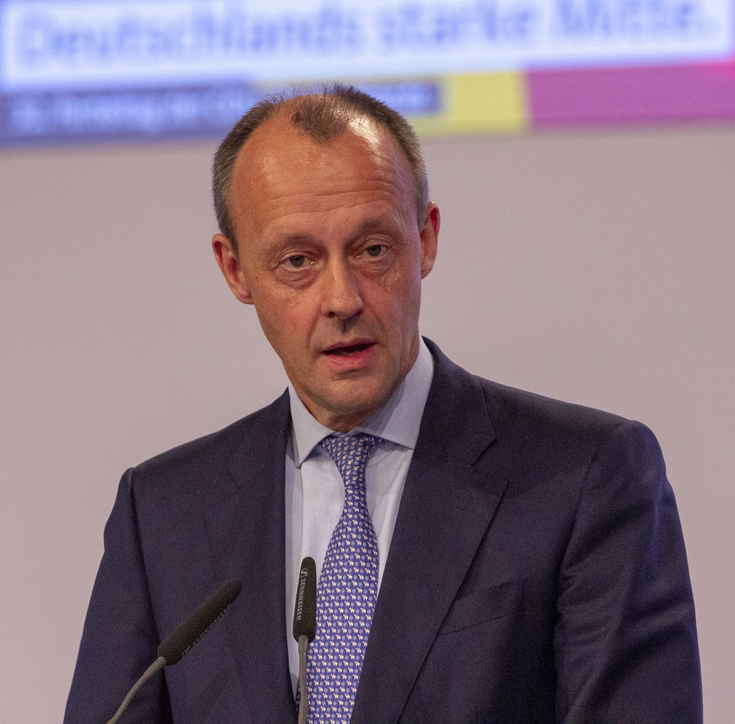 Friedrich Merz